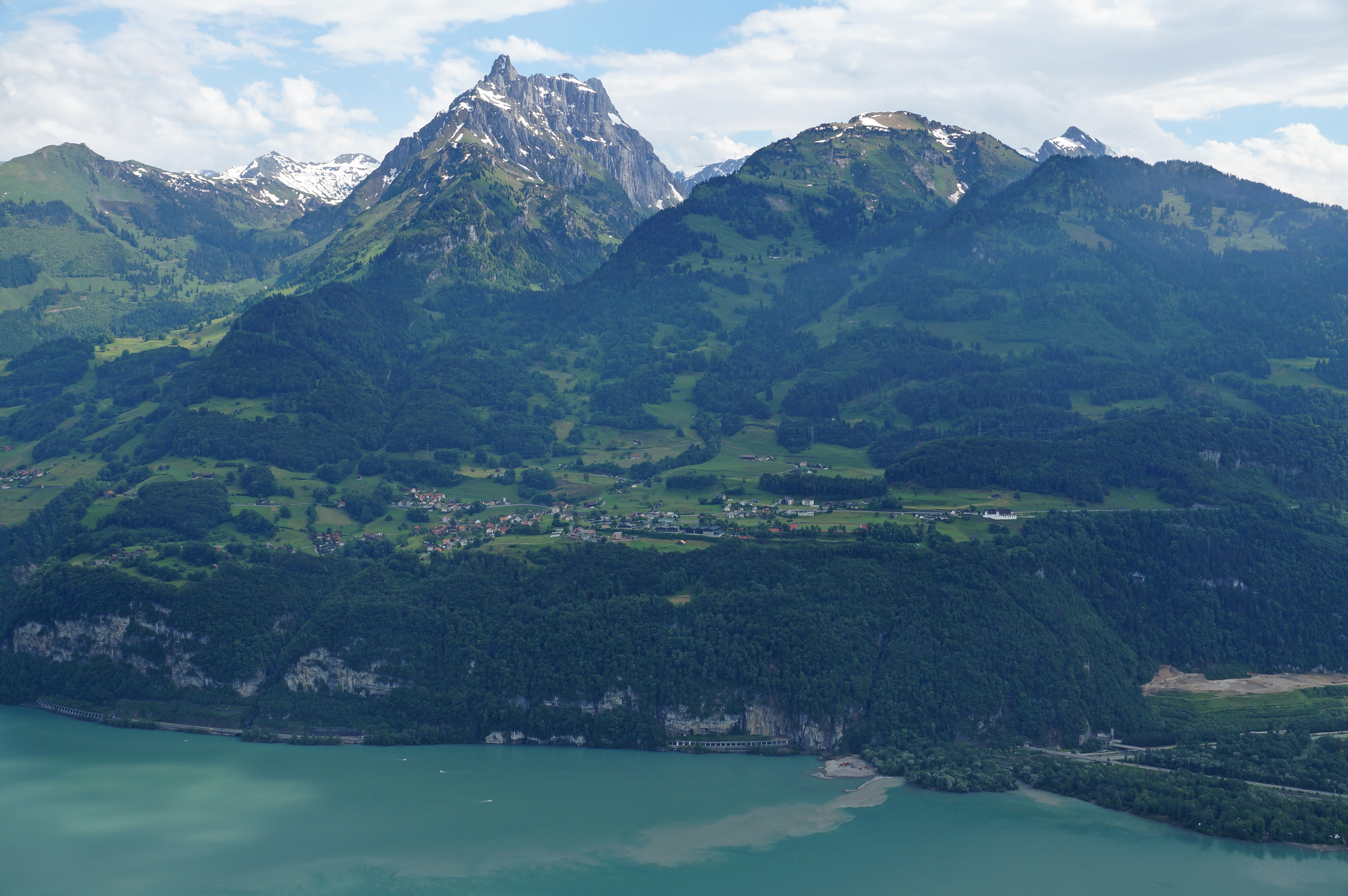 Filzbach und Mürtschenstock von Amden